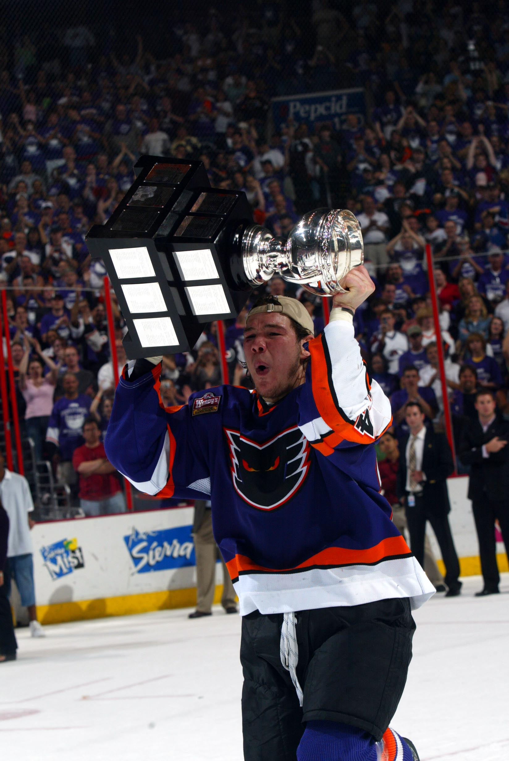 Photo: Bruce Bennett/AHL